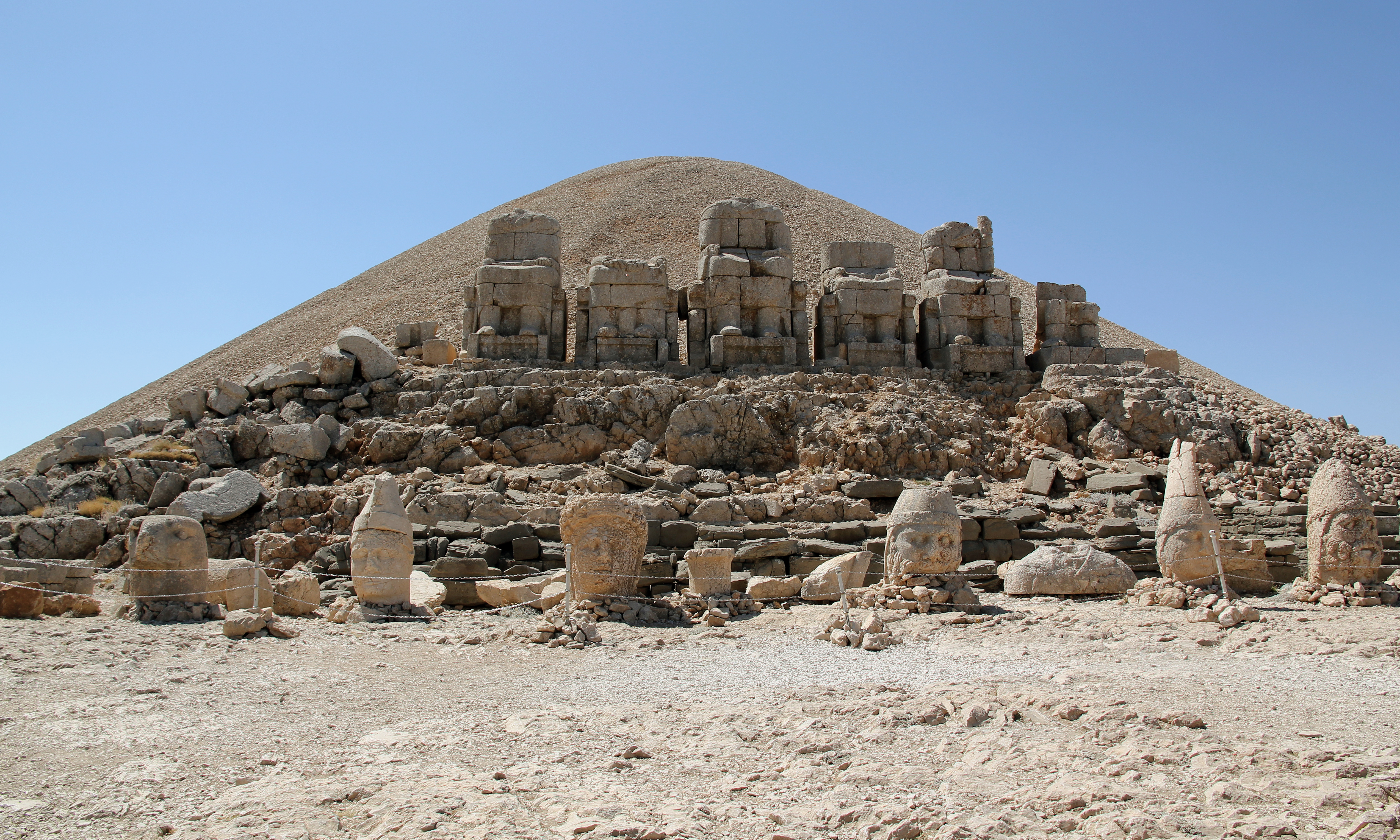 Throne und Köpfe der Monumentalstatuen, von links ein Wächteradler, Antiochos, Kommagene, Zeus, Apollon, Herakles. Nemrut Dağı, Südosttürkei, Ostterrasse